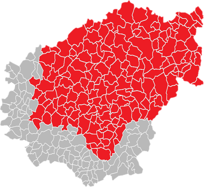 Carte de la première circonscription de la Corrèze avec les communes.